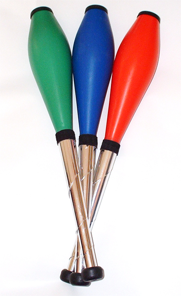 Trois massues de 52,5cm, 200gr environ